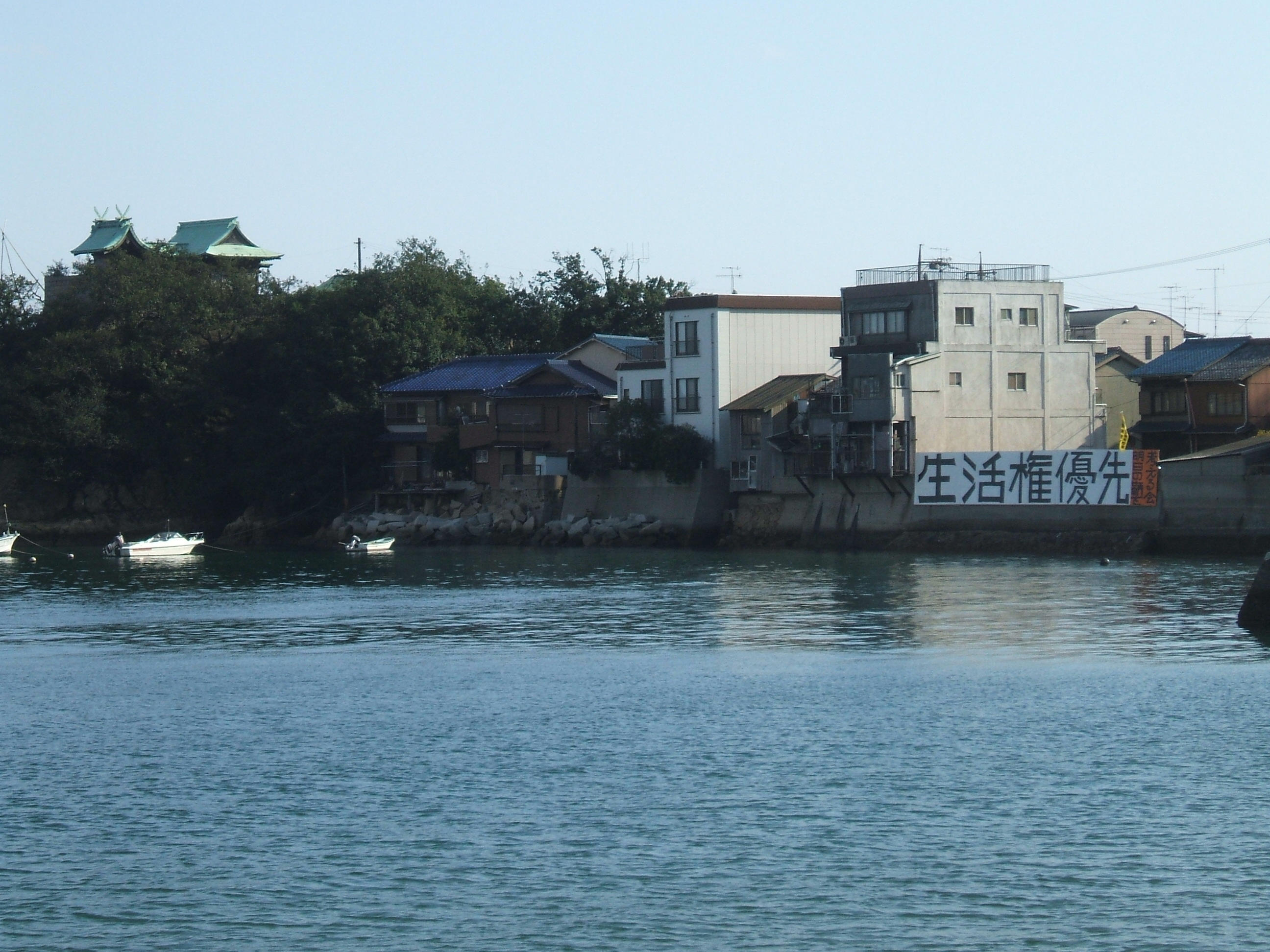 鞆港の西側堤防を撮影した画像